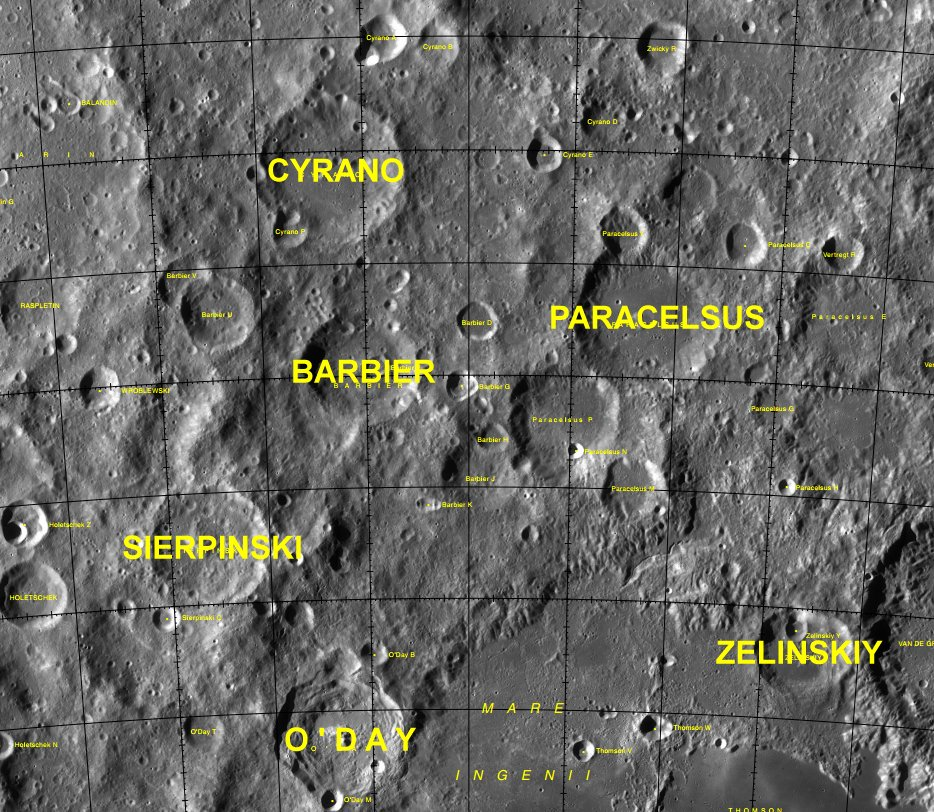 Cráter lunar Paracelsus. Localización. (Imagen LRO)